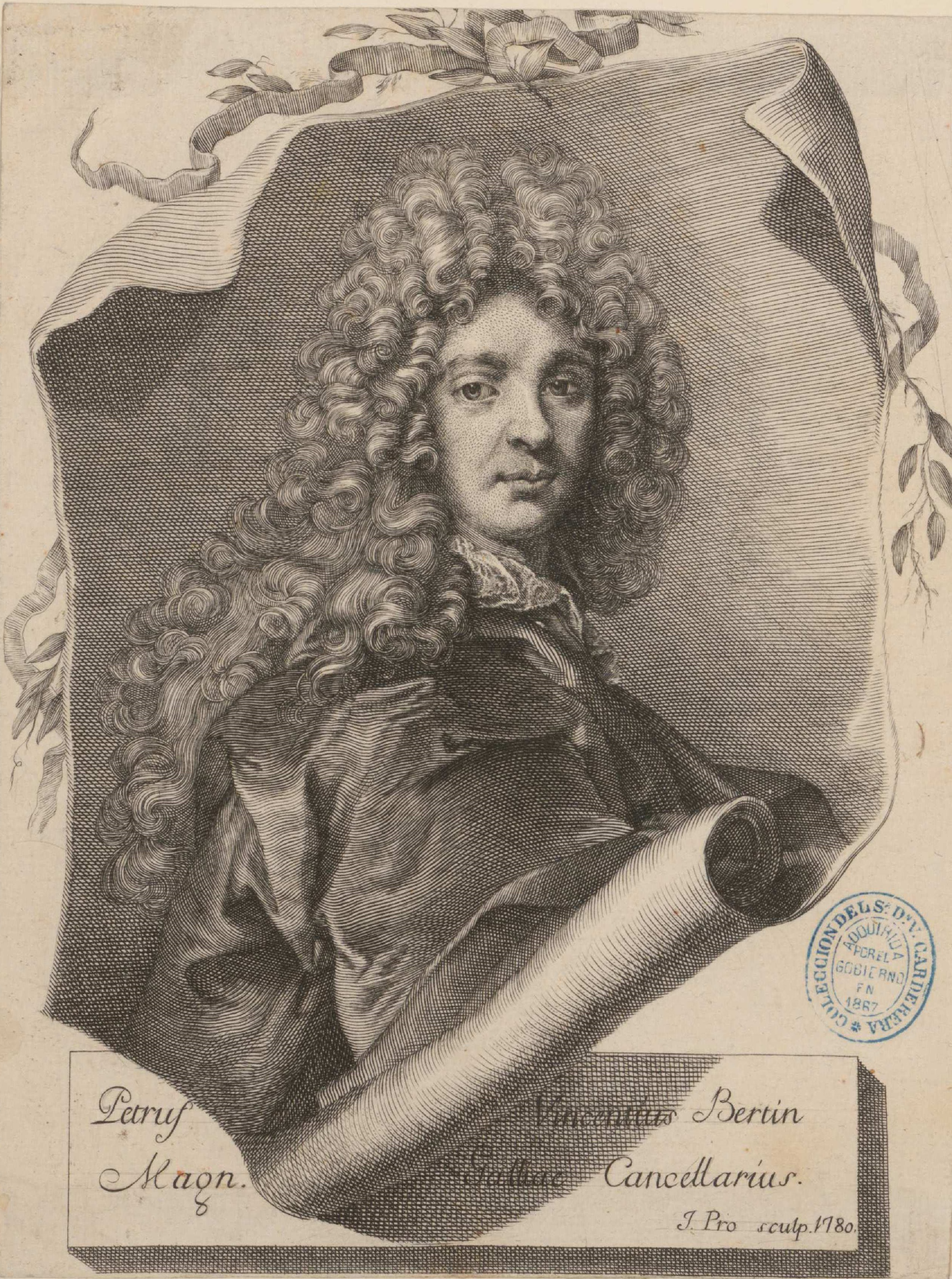 Joaquín Pro, Retrato de Pierre-Vincent Bertin, 1780-Biblioteca Nacional de España. Inscripción: "Petrus Vicentius Bertin Magn. Galliae Cancellaríus."